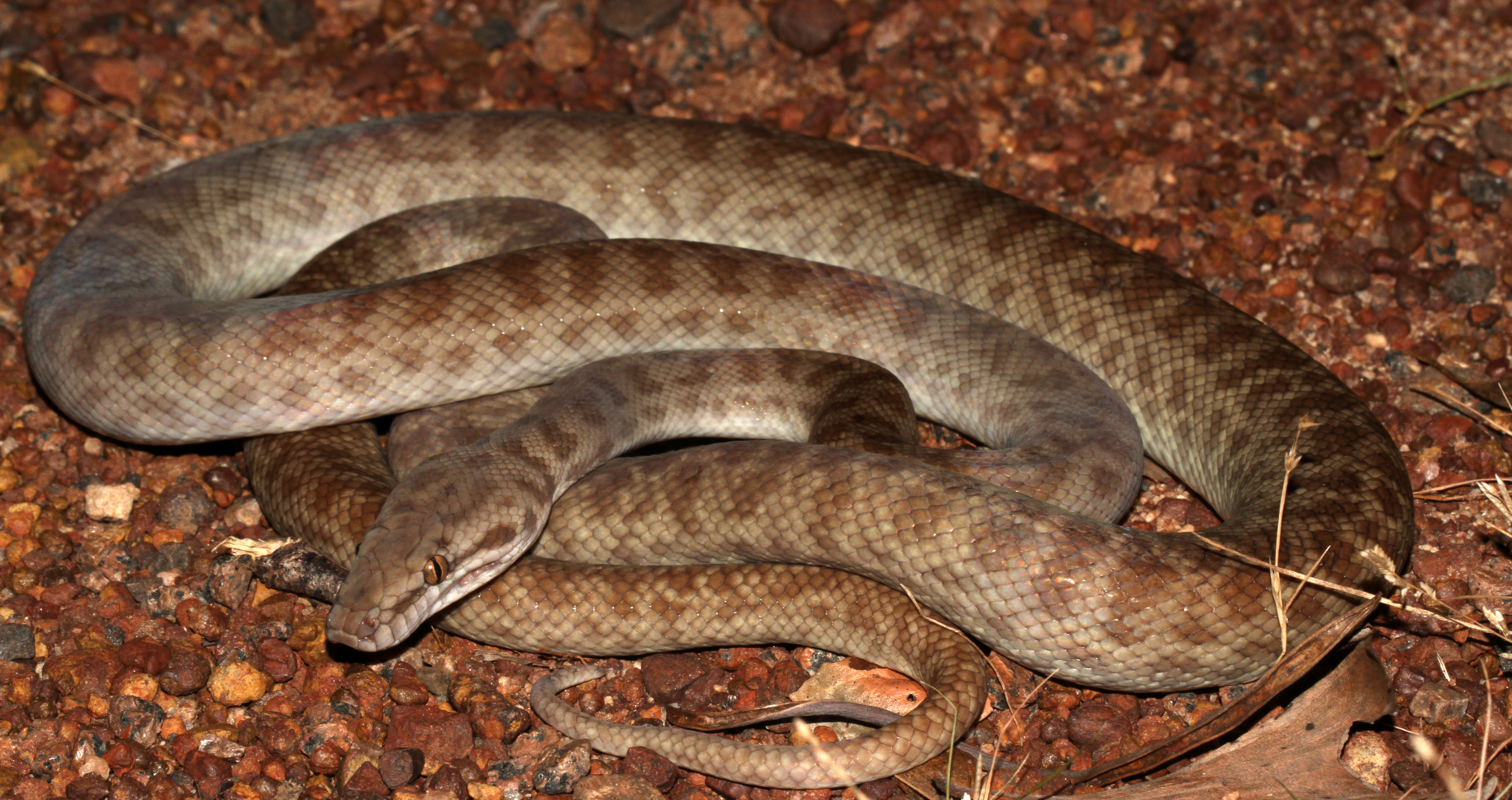 Kakadu NT.